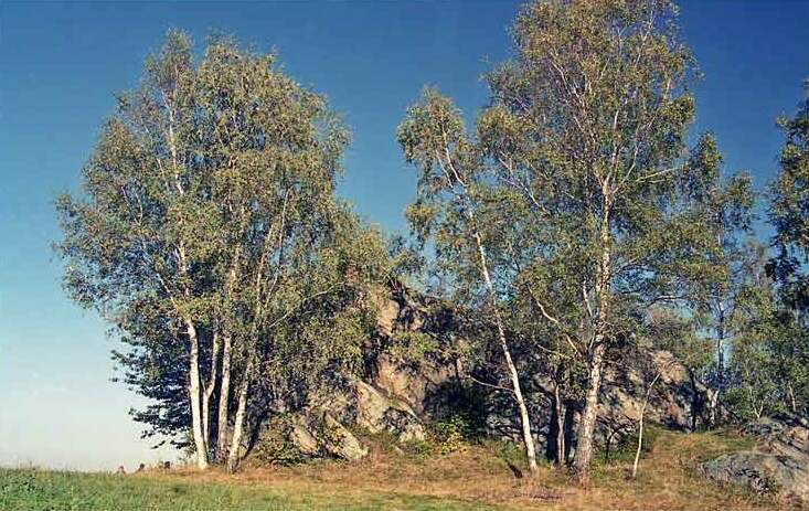 obrázek Hápovy skály u Pusté Kamenice autor:Zp